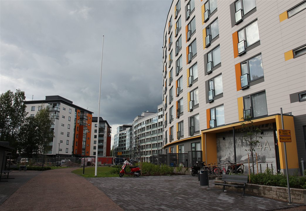 Keimolanmäki (ruots. Käinbybacken) on rakenteilla oleva (tilanne 2016) asuntoalue Vantaan länsiosissa, Kivistön suuralueen Keimolan kaupunginosassa, vilkkaan Hämeenlinnanväylän länsipuolella. Useiden rakennusten sisäänkäyntien yhteyteen on sijoitettu alueen moottoriurheiluhistoriaan liittyvä valokuvasuurennus.